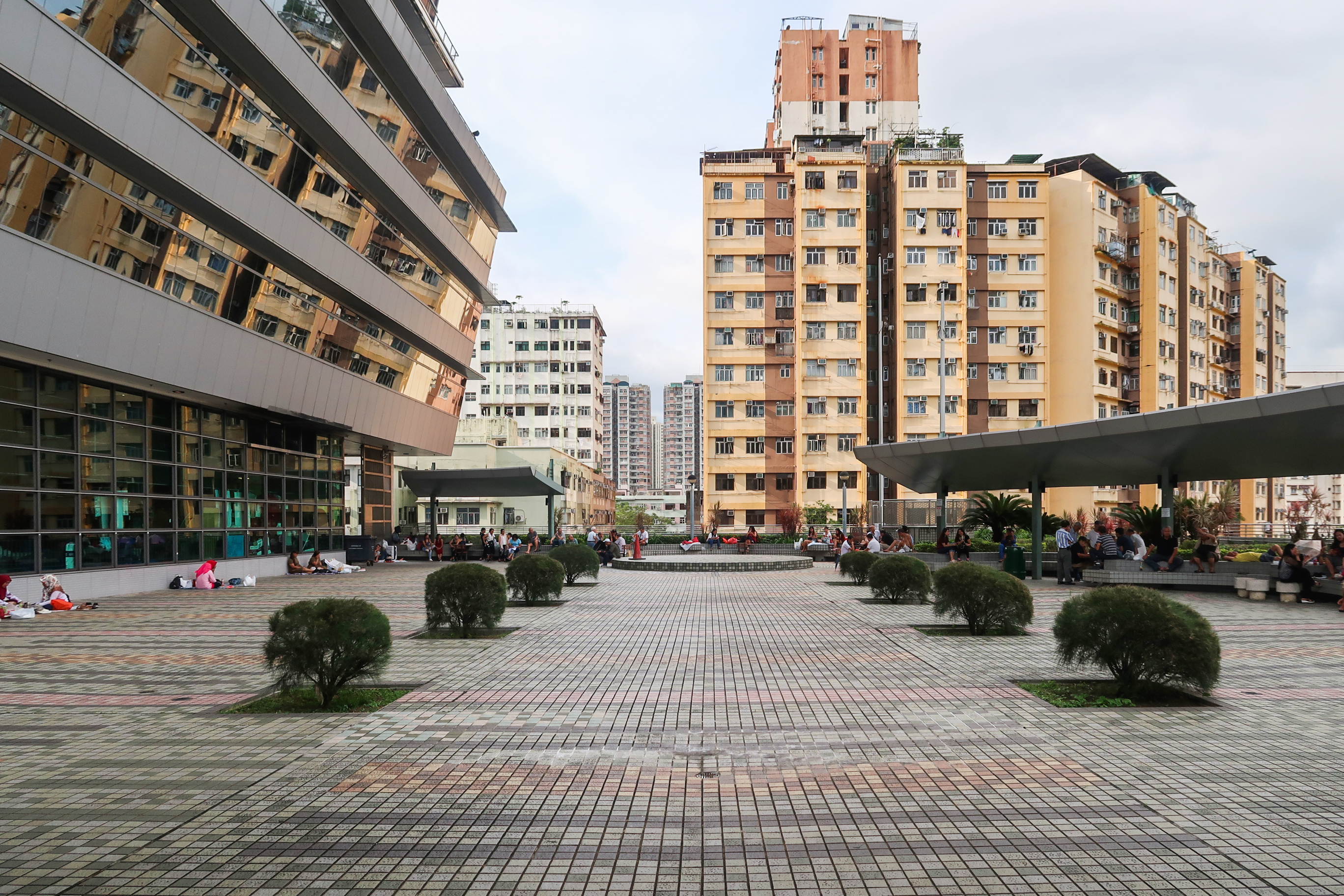 Tai Po Complex Level 2 Podium garden